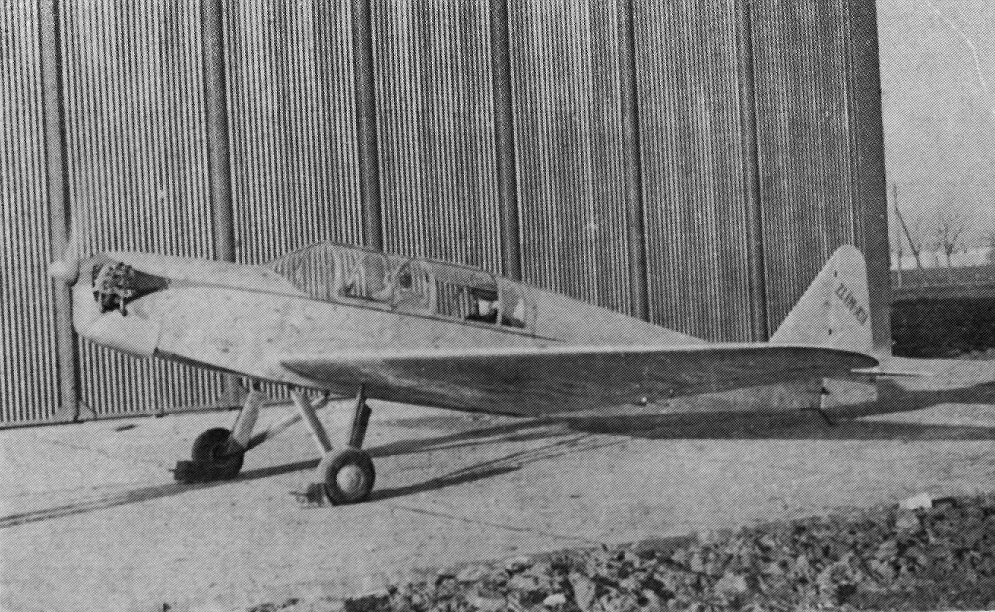 Česky: Zlín Z XII